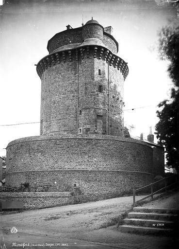 La tour du Papegault à Montfort-sur-Meu en 1884. Photographie de Séraphin-Médéric Mieusement.